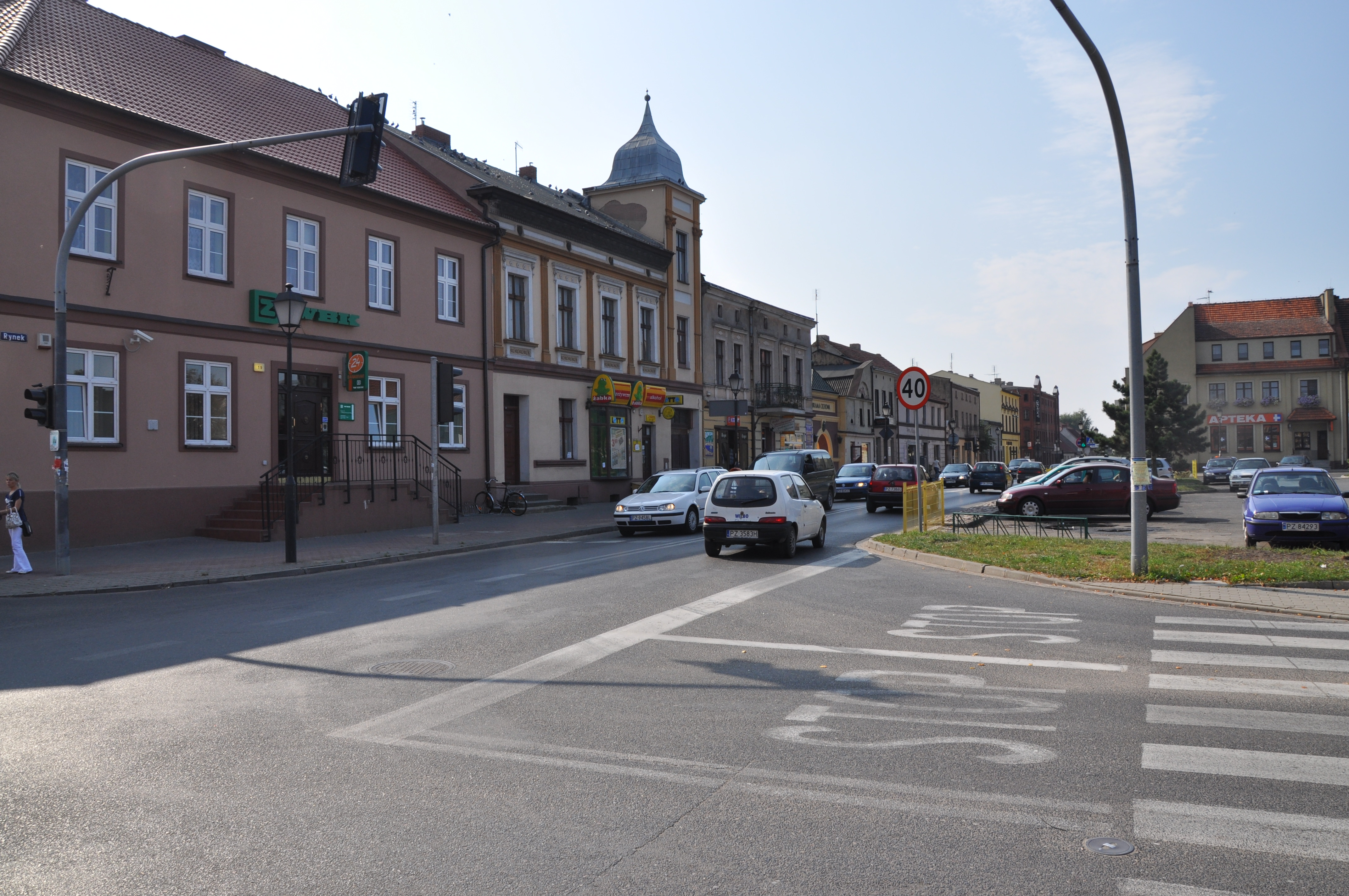 Pierzeja południowa rynku w Kostrzynie